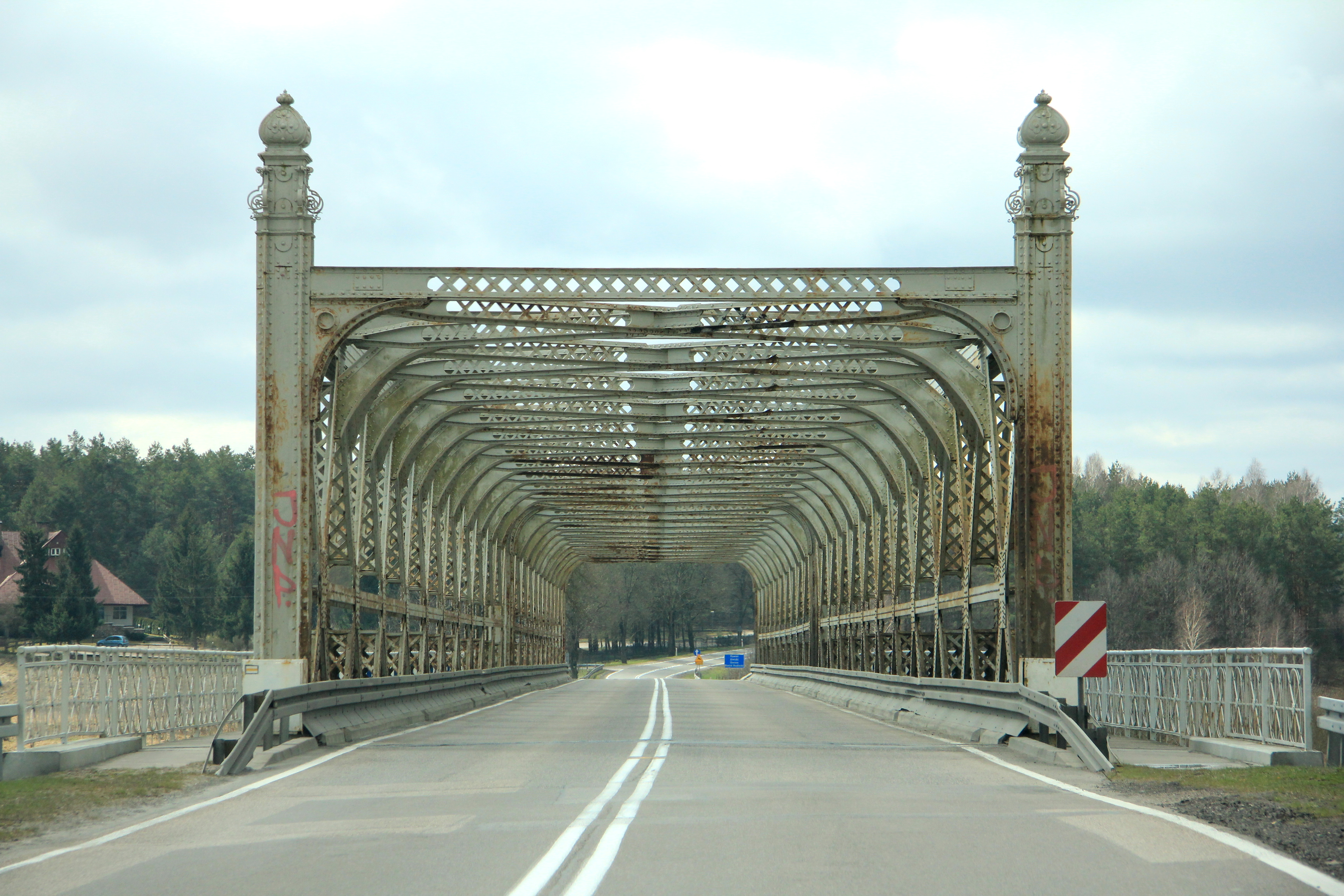 Most fordoński na Narwi w Rybołach, woj. podlaskie